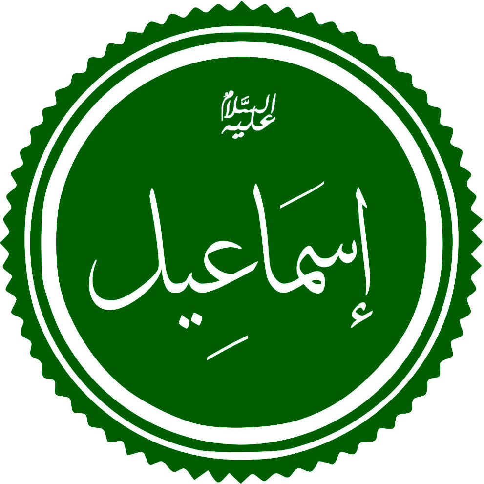 Каллиграфия Исмаил.